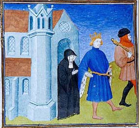 Ludvík V.